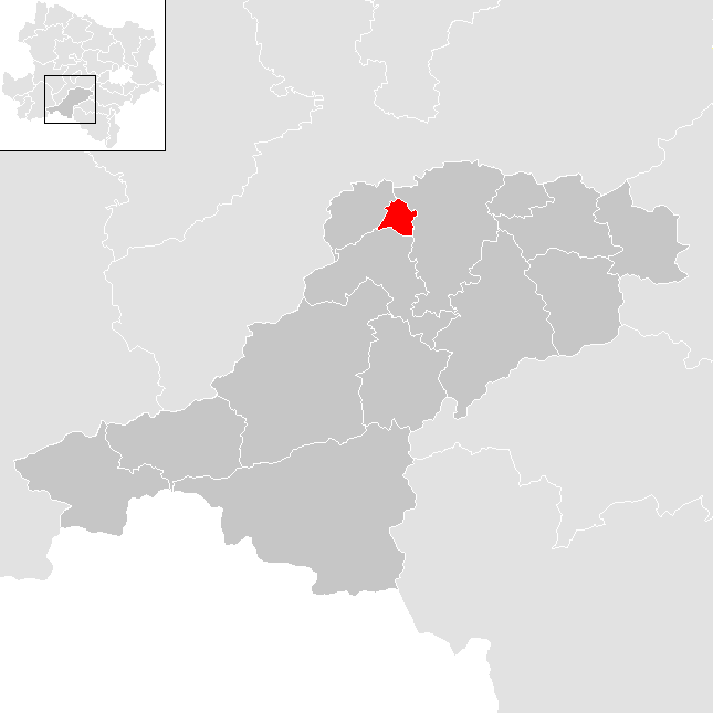 Bezirk Lilienfeld